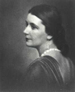 Foto der Schauspielerin Lil Dagover.